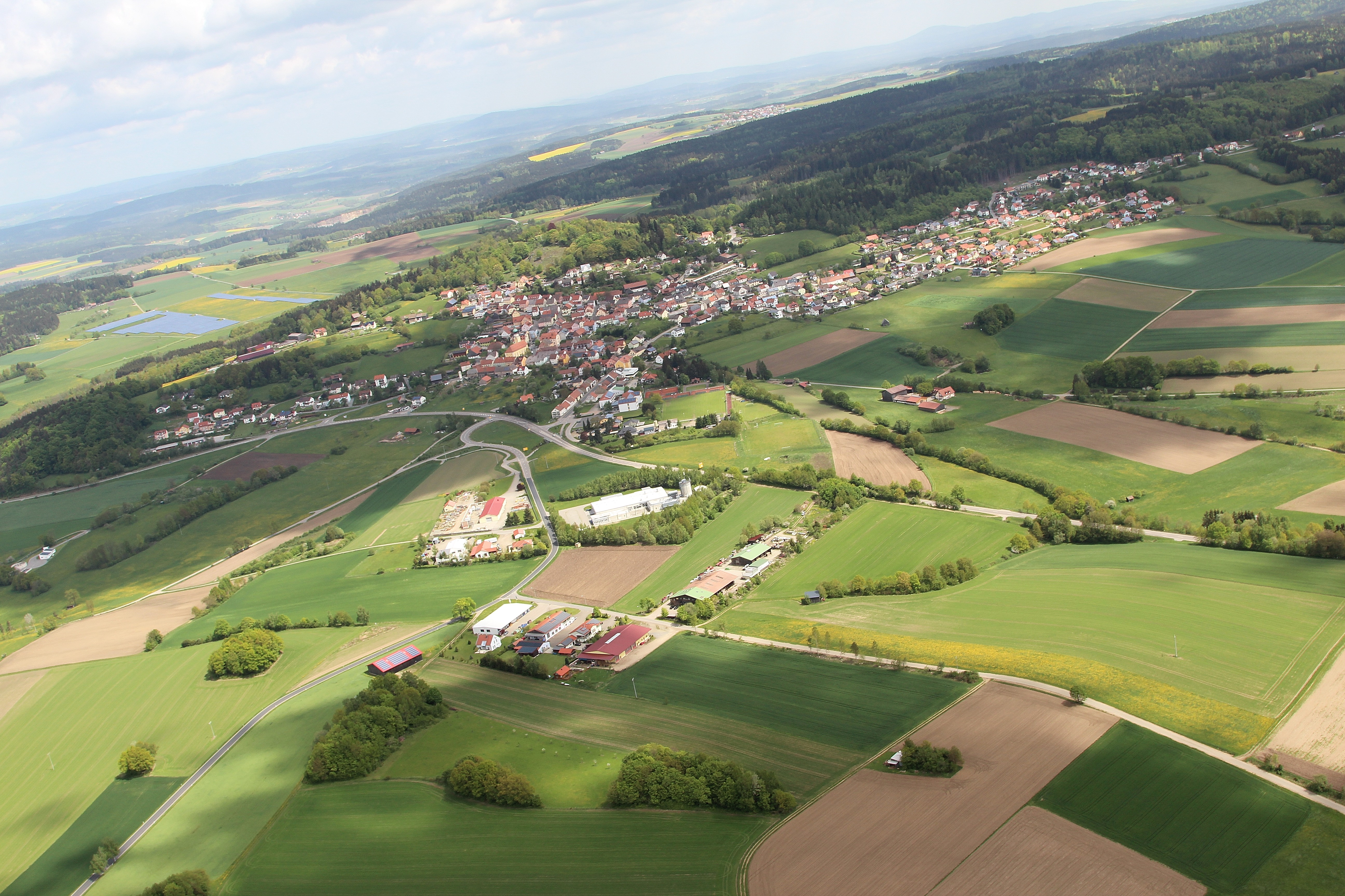 Tännesberg, Landkreis Neustadt an der Waldnaab, Oberpfalz, Bayern (2015)